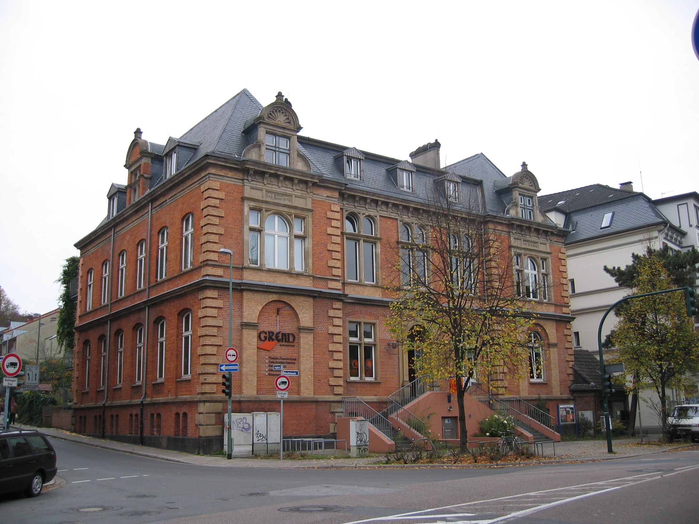 Buildings in Essen-Steele GREND in Steele